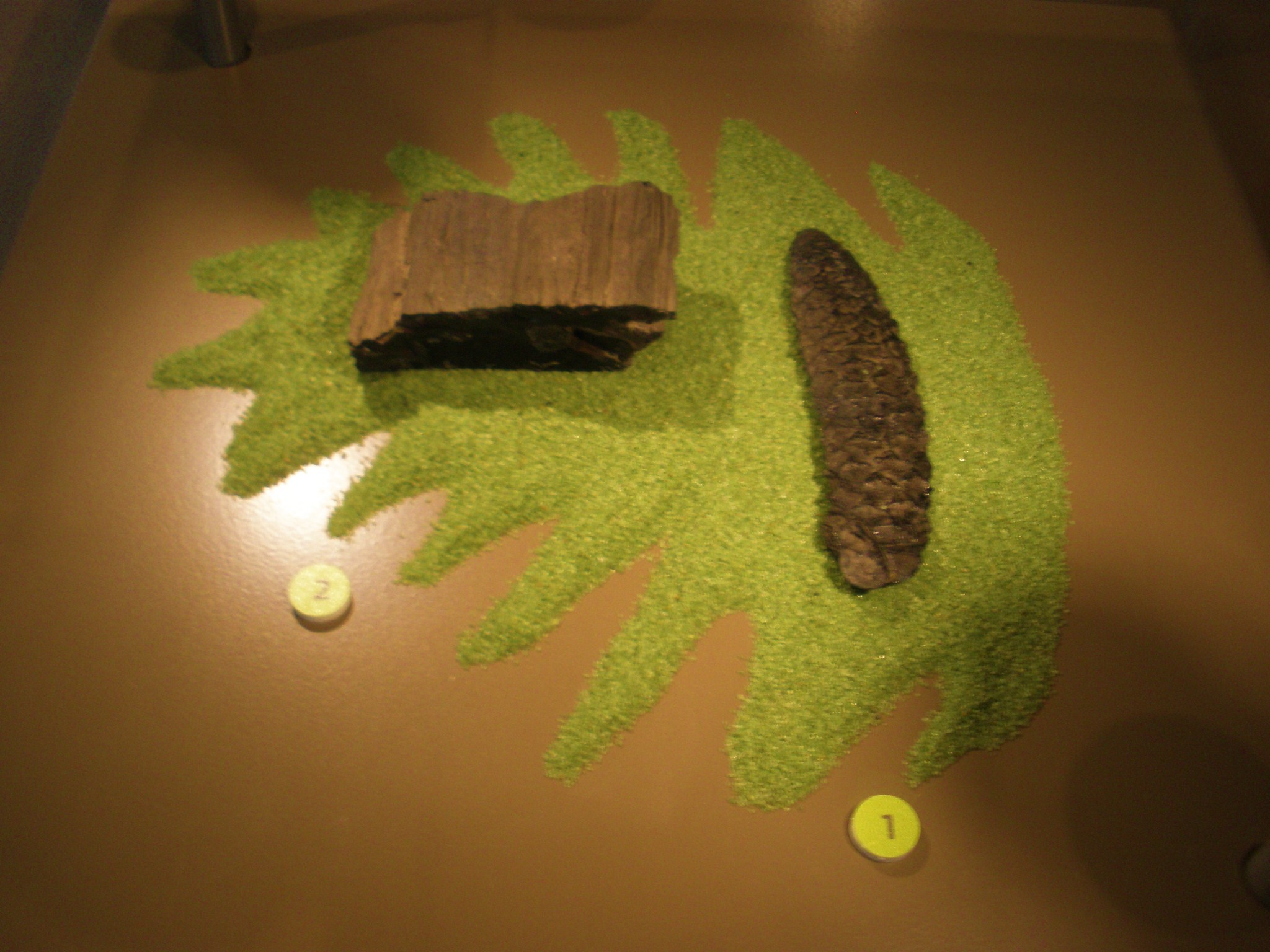 Fossil of Pityostrobus, an extinct plant Took the photo at Musee d'Histoire Naturelle, Brussels